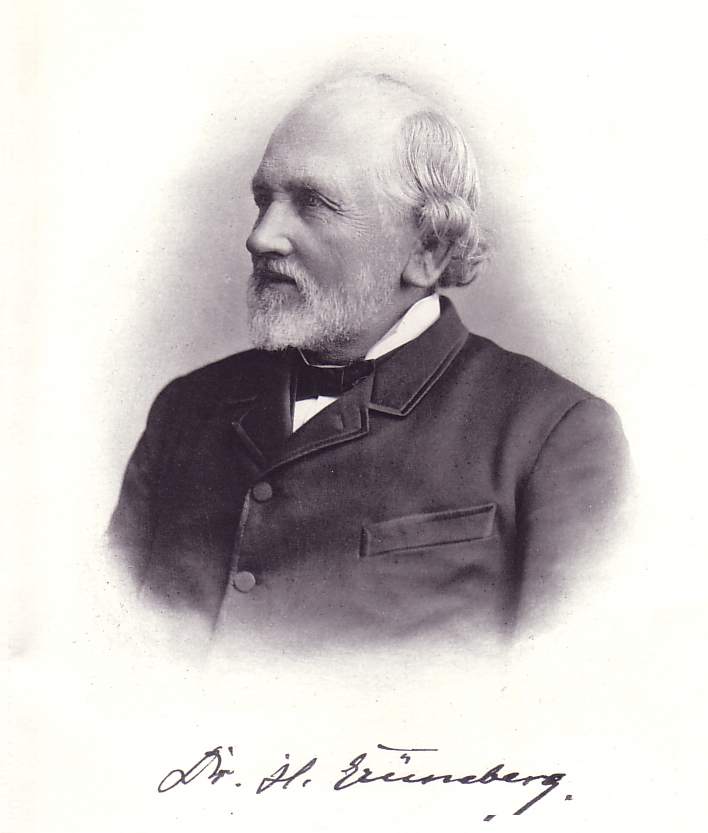 Portrait Hermann Julius Grüneberg (* 11. April 1827 in Stettin; † 7. Juni 1894 in Köln)